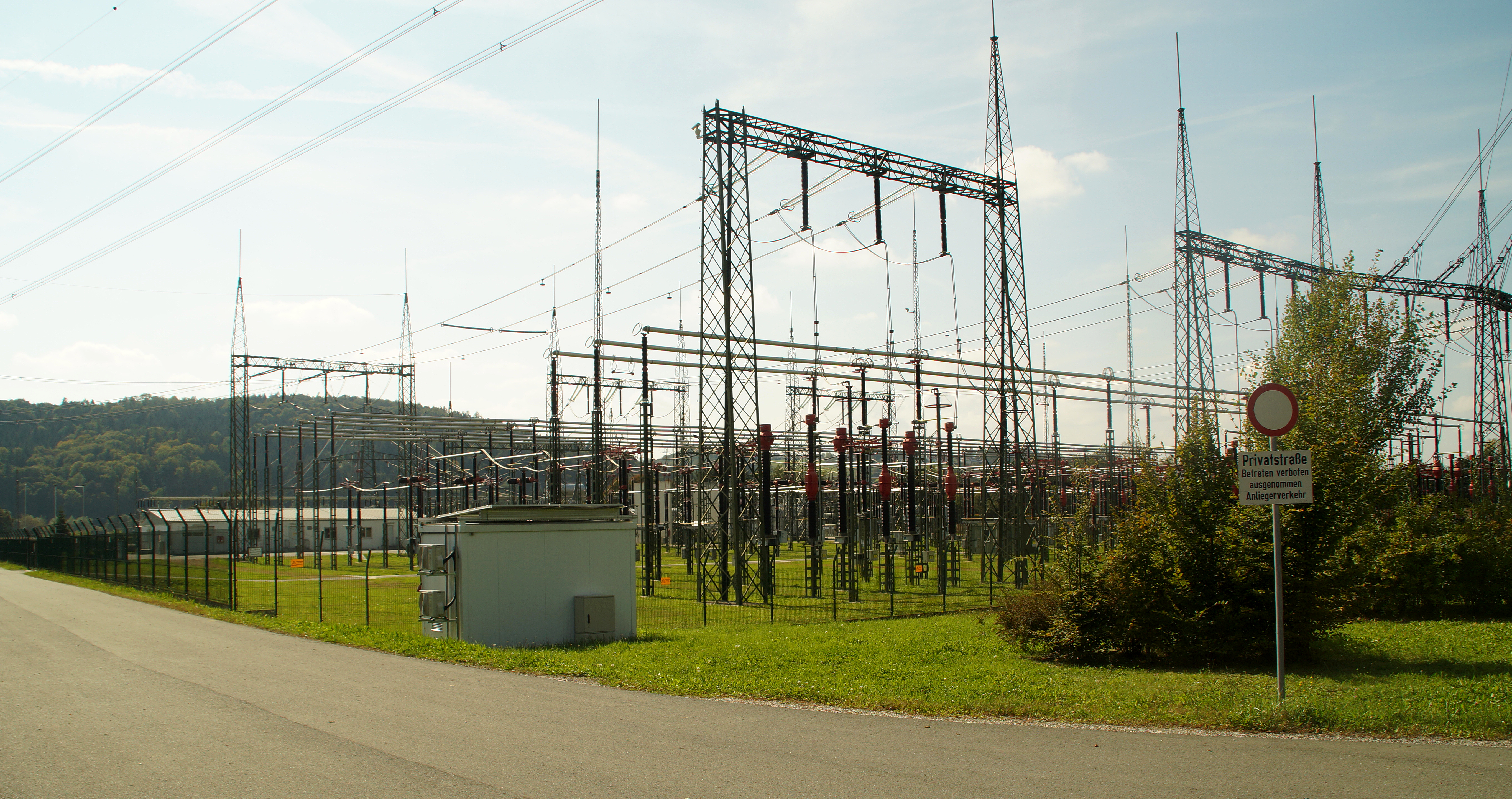 Das Umspannwerk Oststeiermark/Wünschendorf, südöstlich von Gleisdorf, Steiermark, Österreich